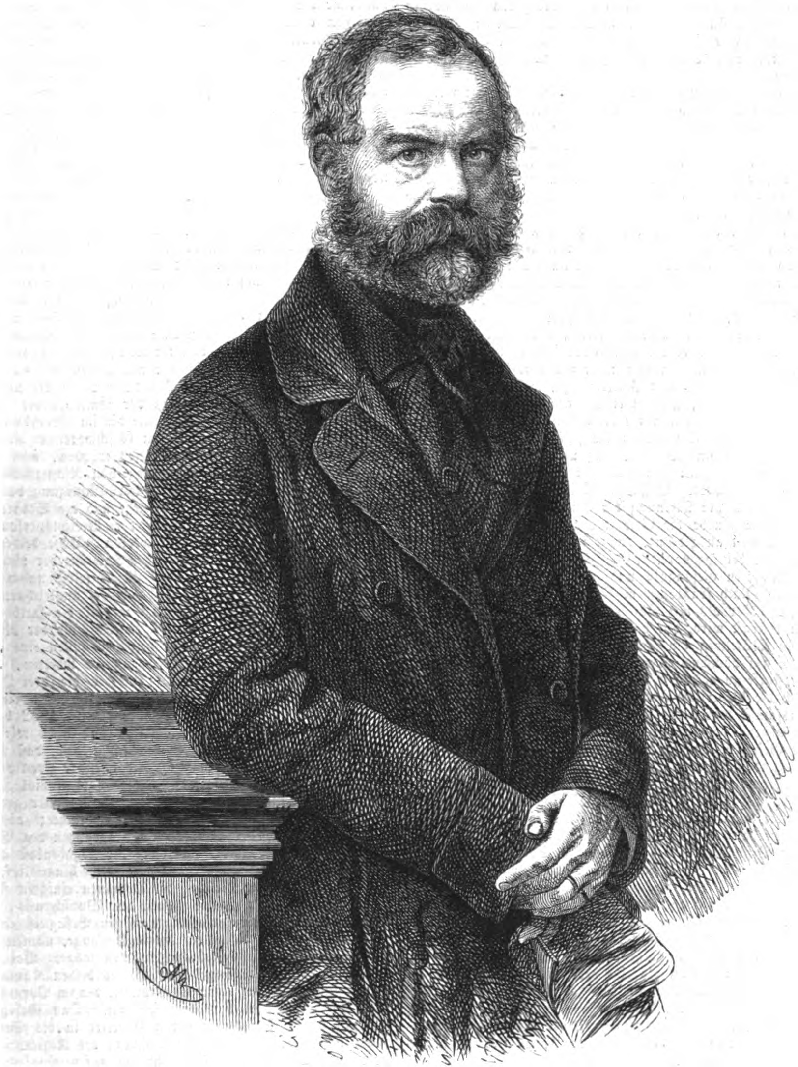 Gustav von Lerchenfeld, bayerischer Finanzpolitiker im 19. Jh.